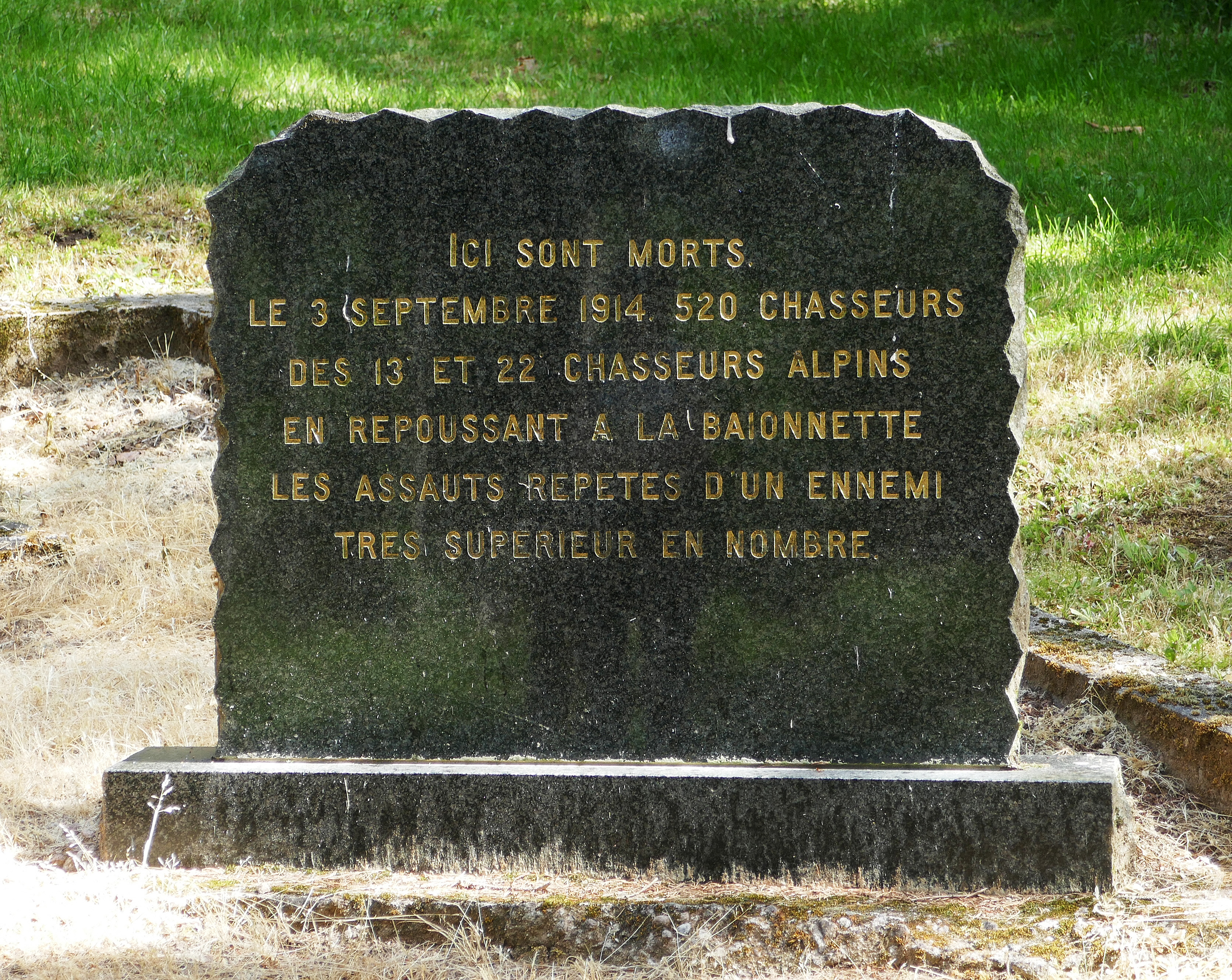 Le carré militaire de la Tête de la Behouille (La Croix-aux-Mines, Vosges) en juin 2018.